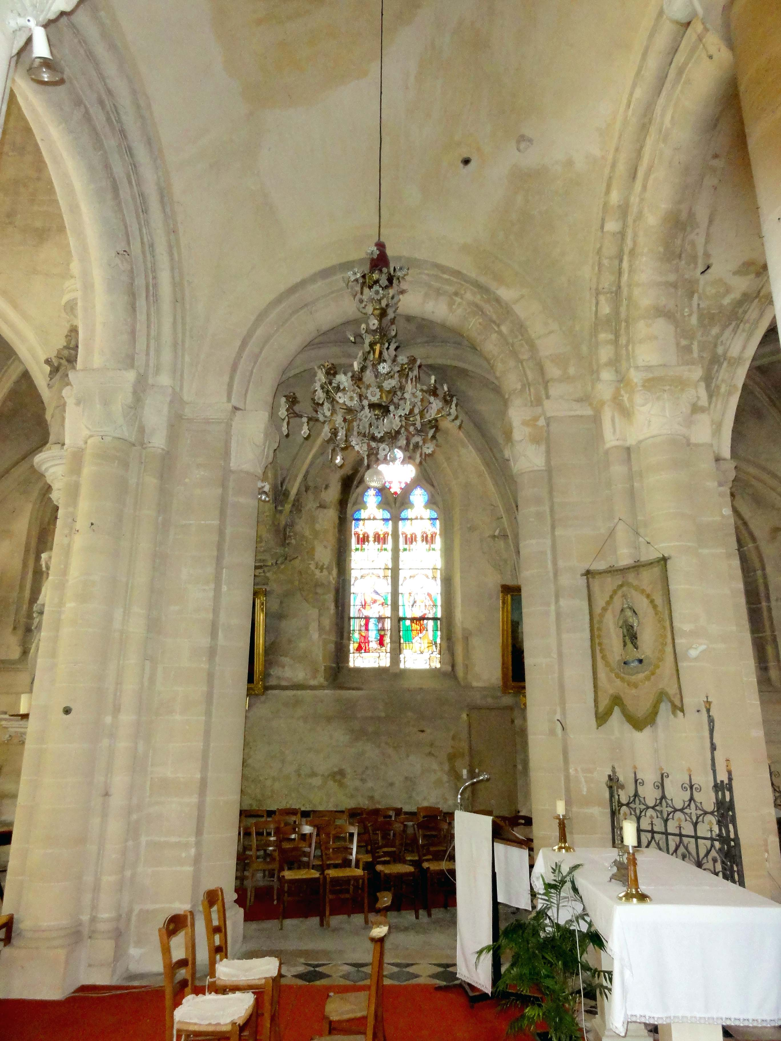 Intérieur de l'église (voir titre).